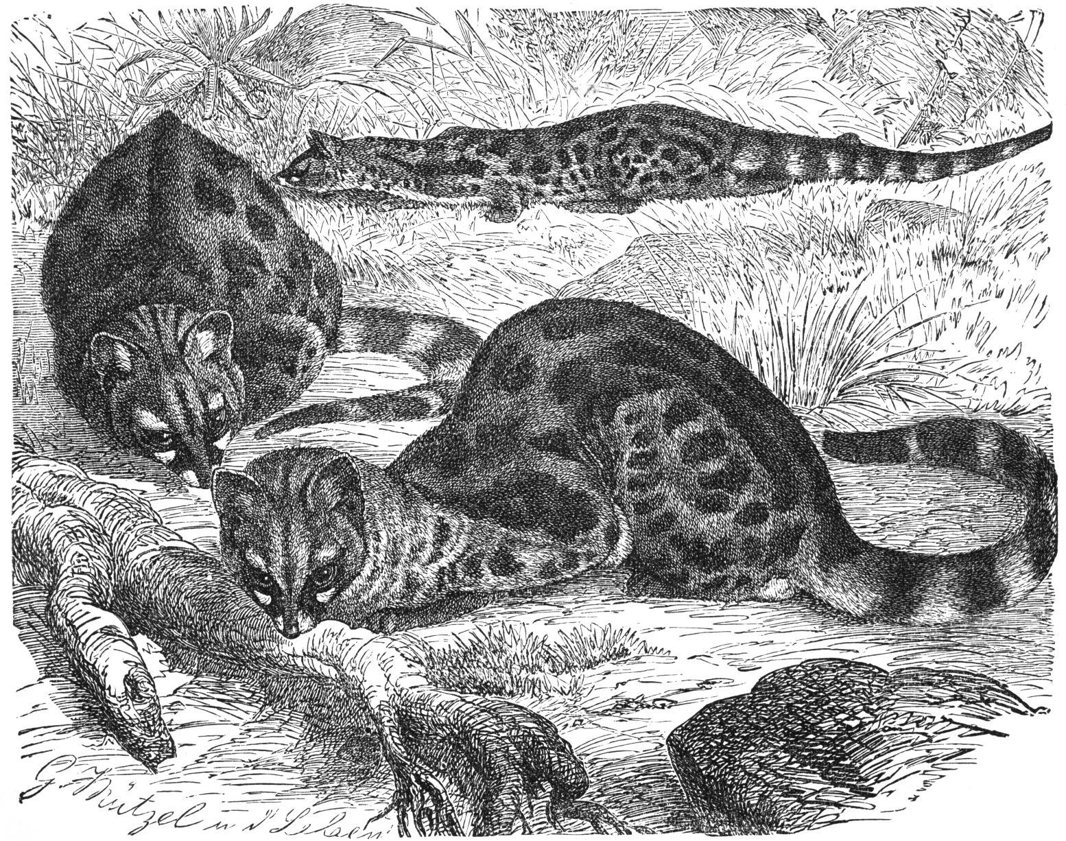 Original caption: "Europäische Genette, Genetta genetta L. 1/4 natürlicher Größe." Translation (partly): "Small spotted genet, Genetta genetta L. 1/4 natural size." Size: 5.2 x 4.1 in² (13.2 x 10.4 cm²)